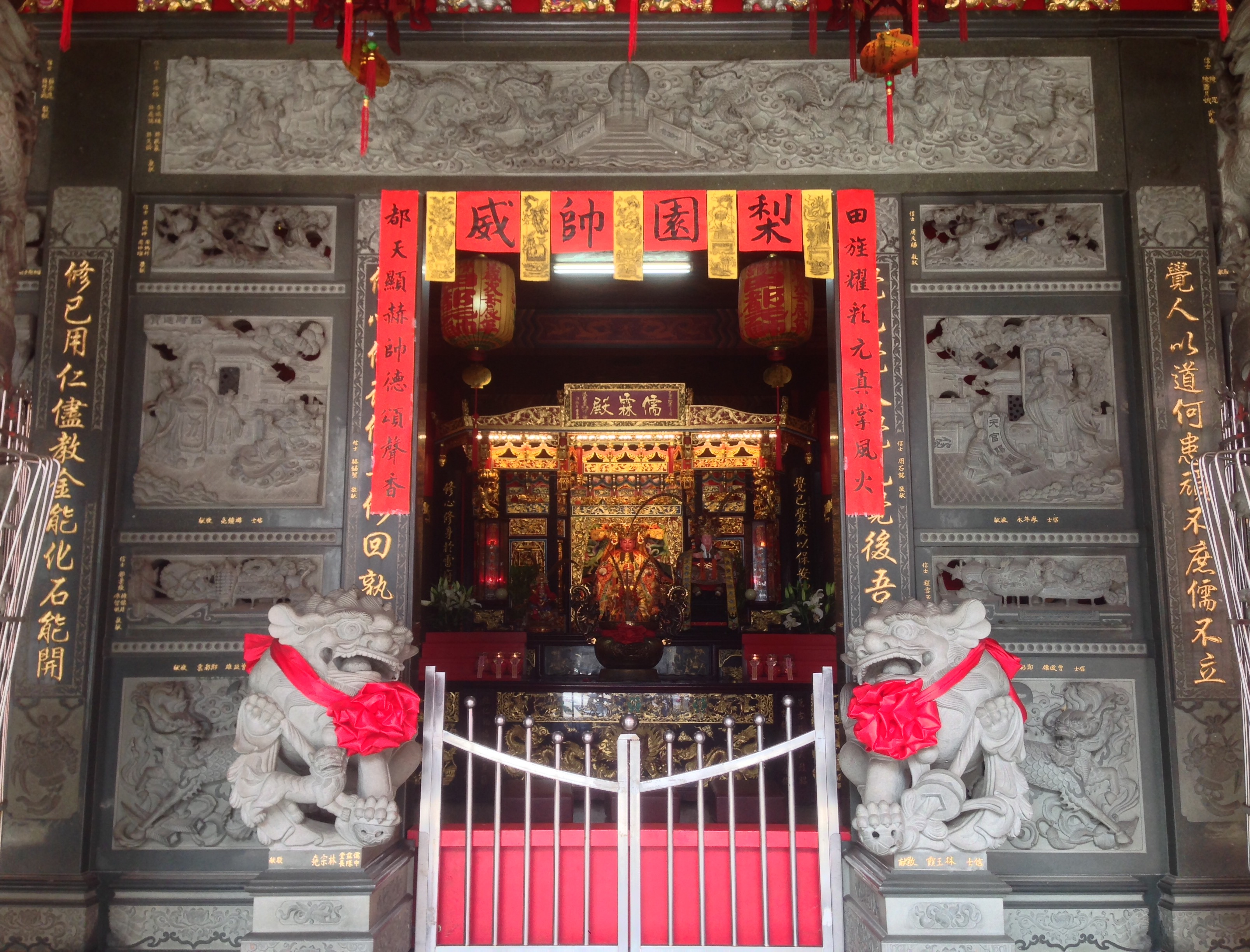 中文（台灣）: 基隆覺修宮田都元帥神像與中門